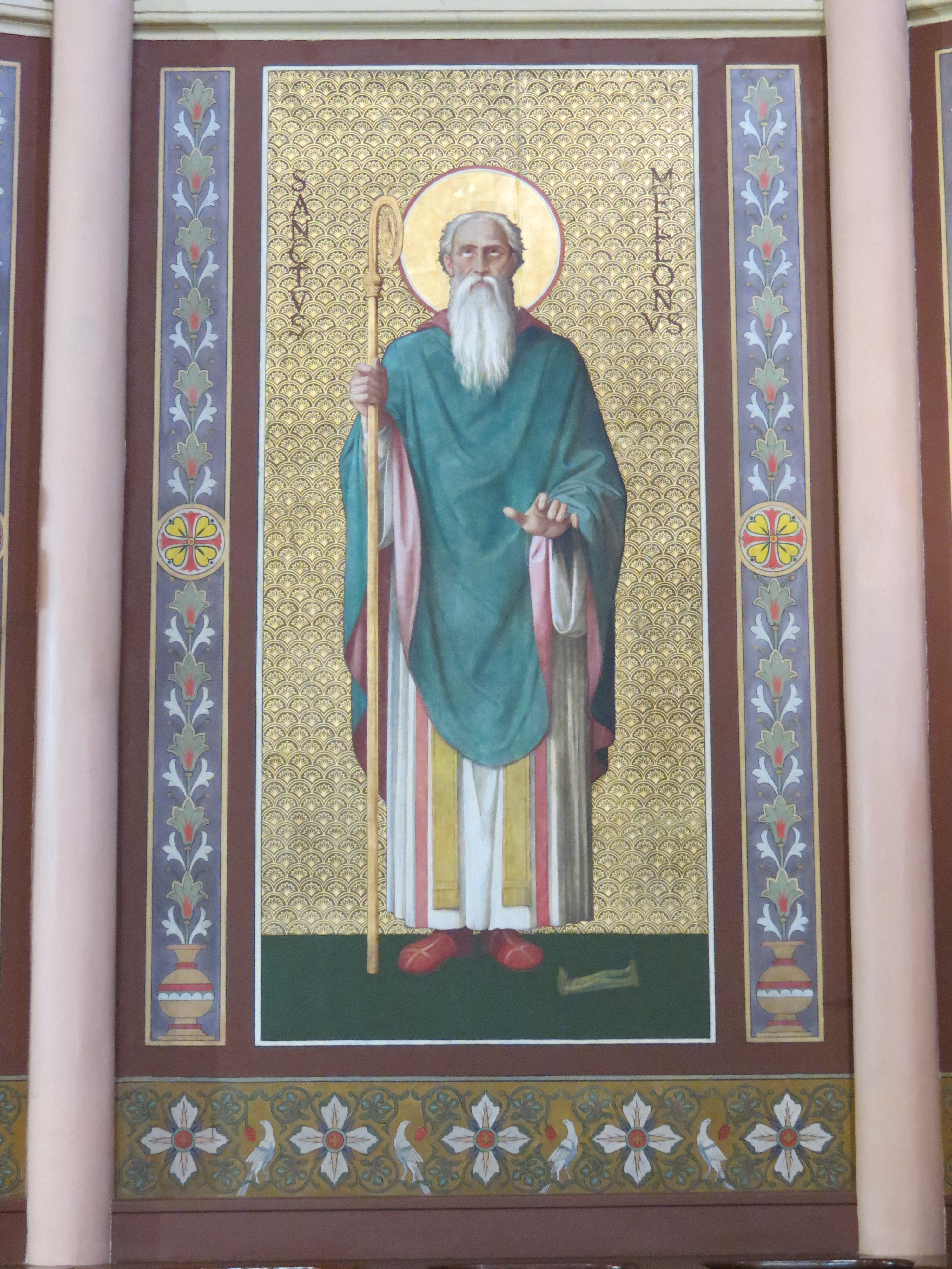 Peinture de l'abside de l'église Saint-Gervais de Rouen représentant Mellon.